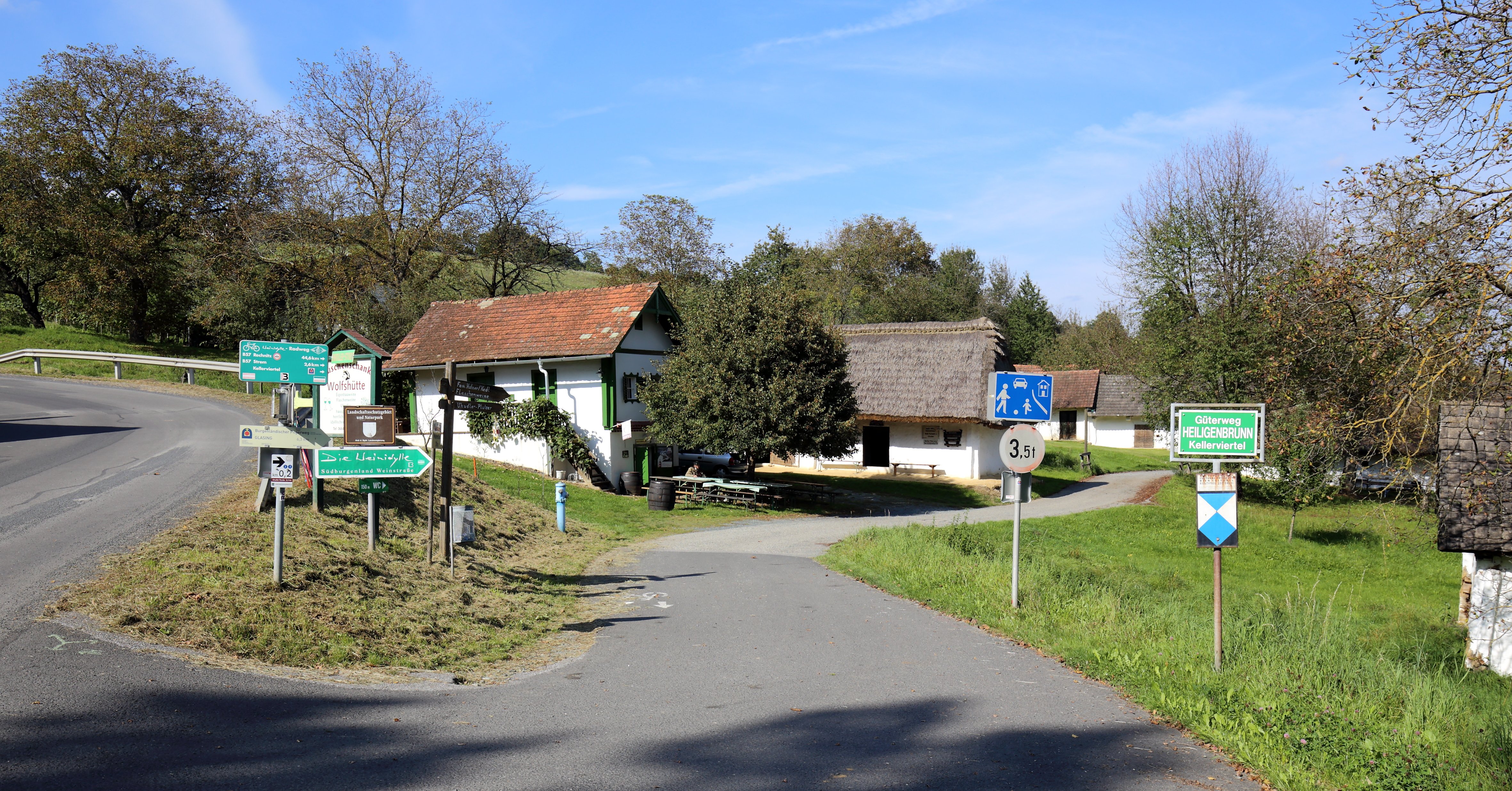 Güterweg Kellerviertel in der burgenländischen Gemeinde Heiligenbrunn.